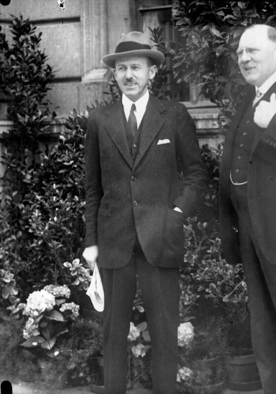 Die Deligationsführer der grossen Haager Conferenz! Der schwerreiche italienische Gross-Industrielle Pirelli, welcher Staatssekretär Grandi in den Finanzfragen beraten und begleiten wird.